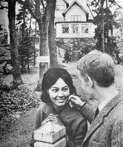 Fatima och Gösta Ekman. Bilden är tagen utanför Karl Gerhards "Kråkslottet" i Saltsjöbaden